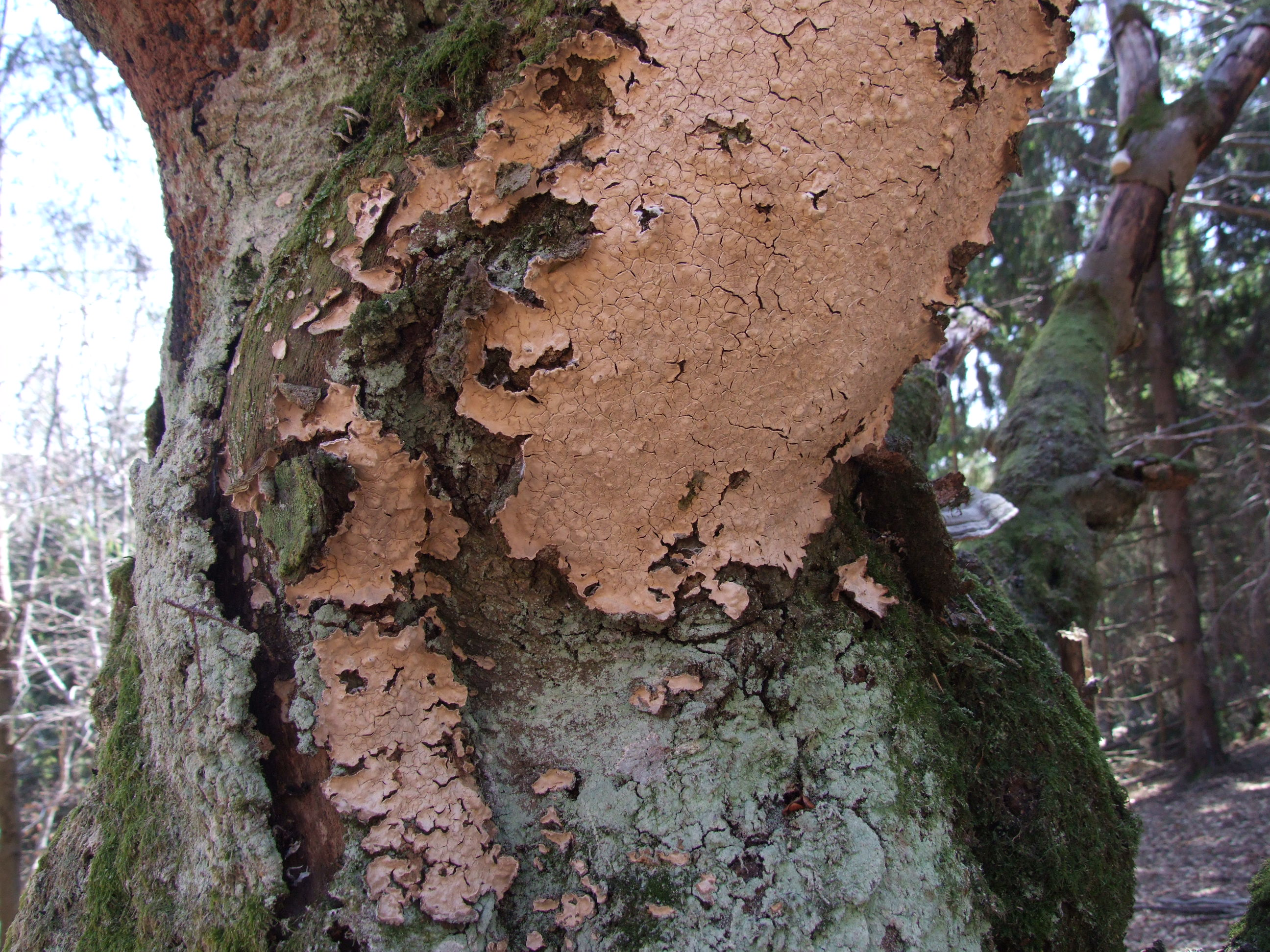 Peniophora quercina